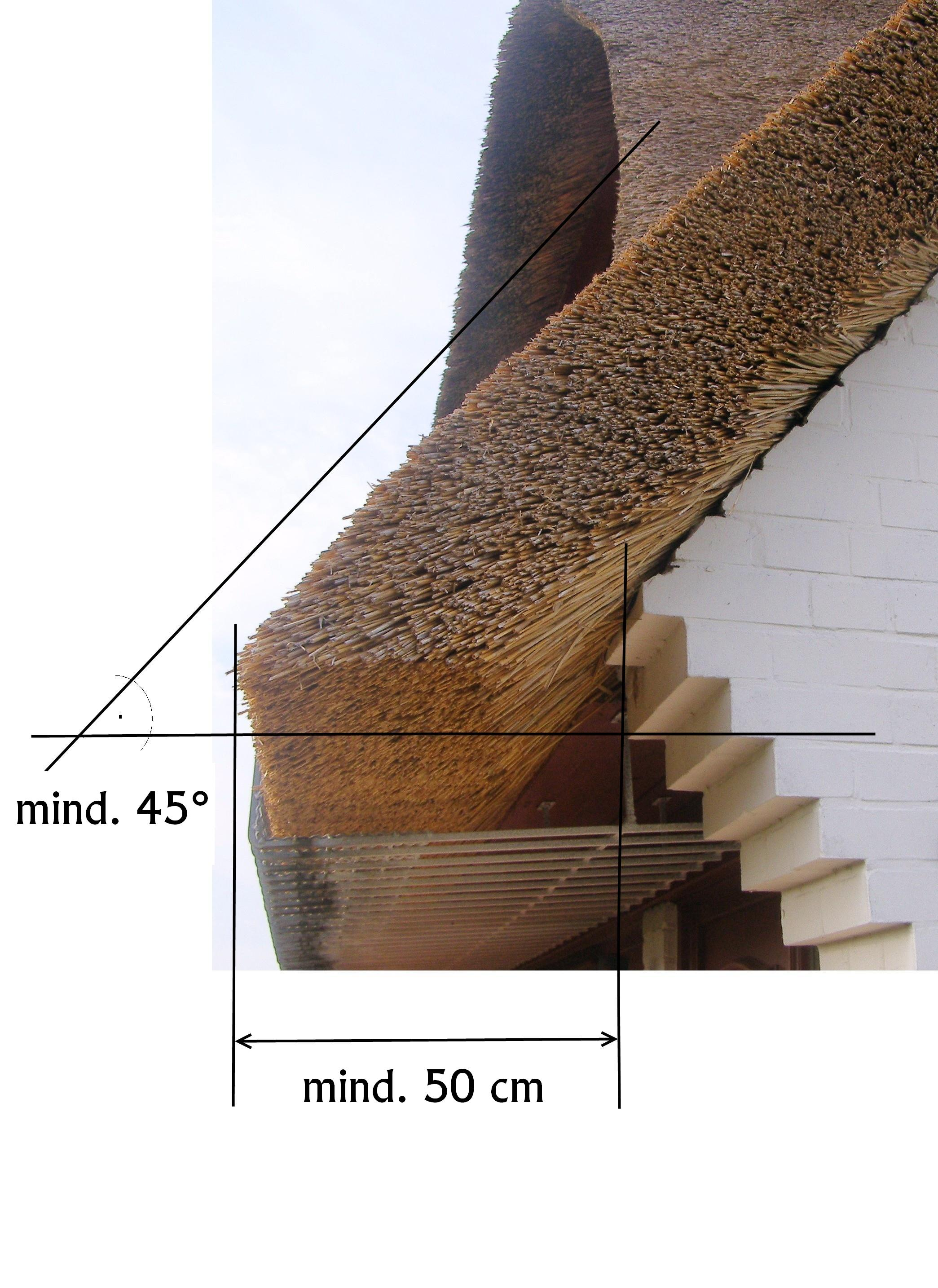 Schema eines Reetdaches, eigenes Foto (Sylt, Braderup, 10.08.2007), Abmessungen eingetragen nach einer Zeichnung der Reetdachdeckerinnung [1]